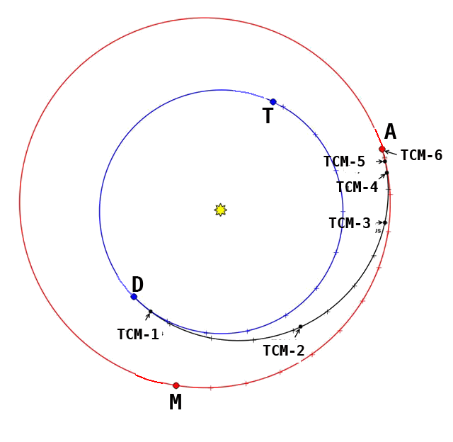 Trajectoire de la sonde spatiale InSight entre la Terre et Mars